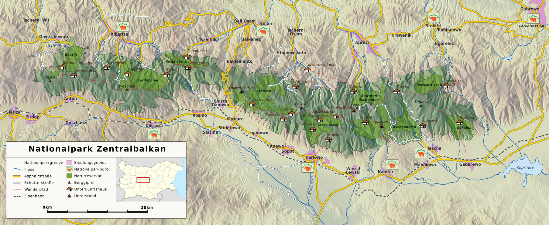 Nationalpark Zentralbalkan